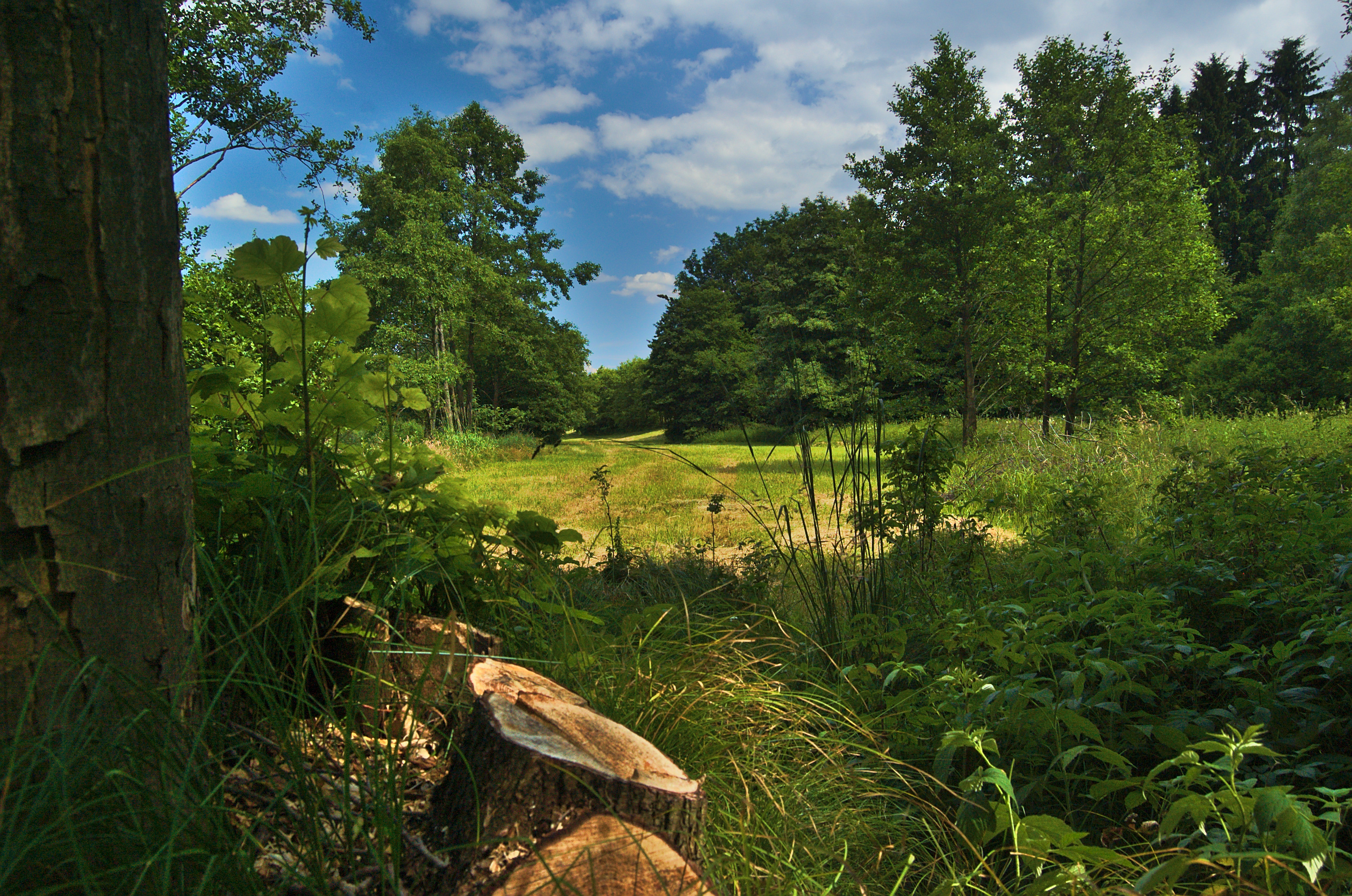 Přírodní památka Pod liščím kupem, Buková, okres Prostějov